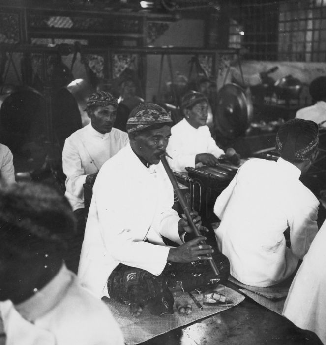 Negatief. Man die de suling bespeelt in een gamelanorkest